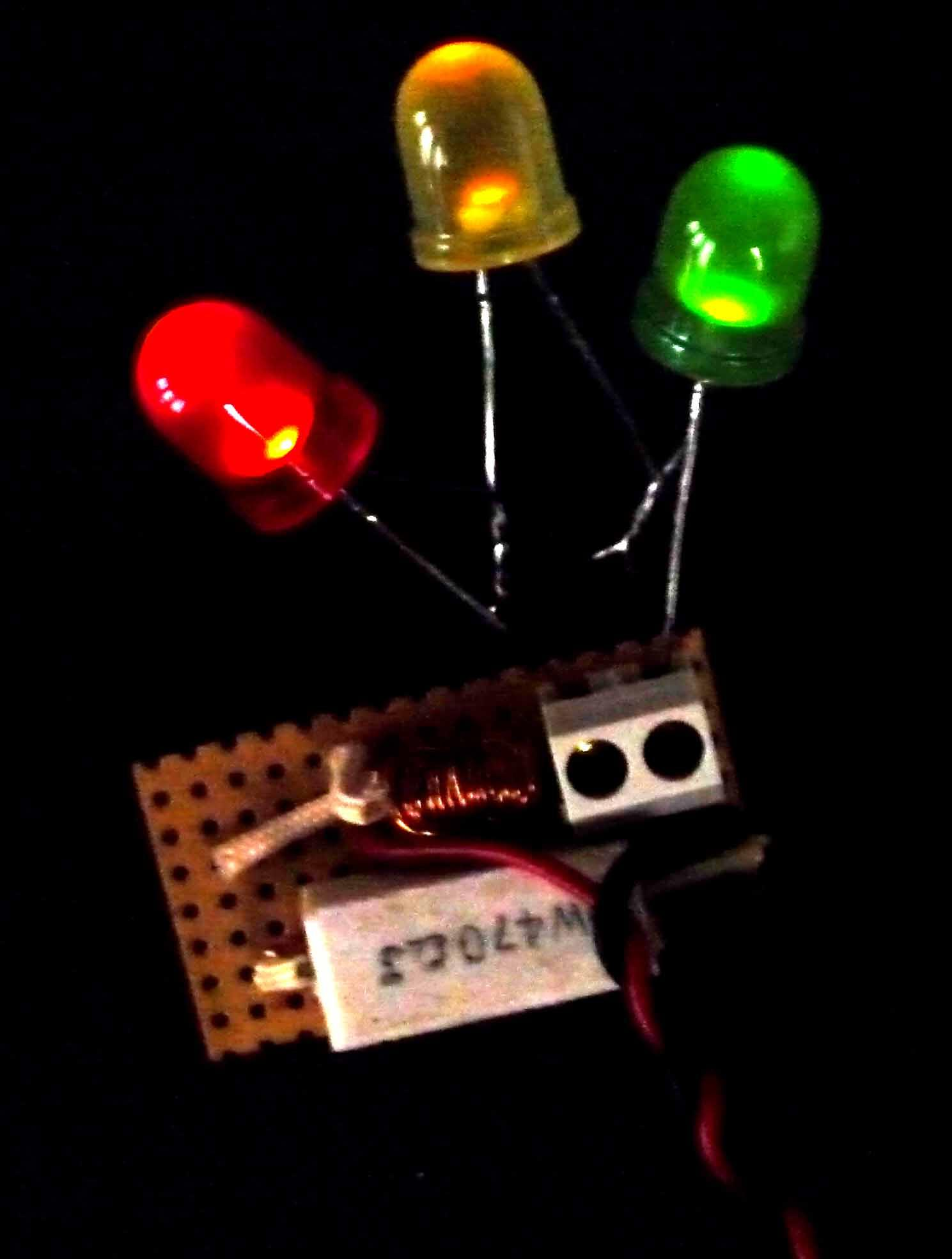 Voleur de joule à 3 LEDs